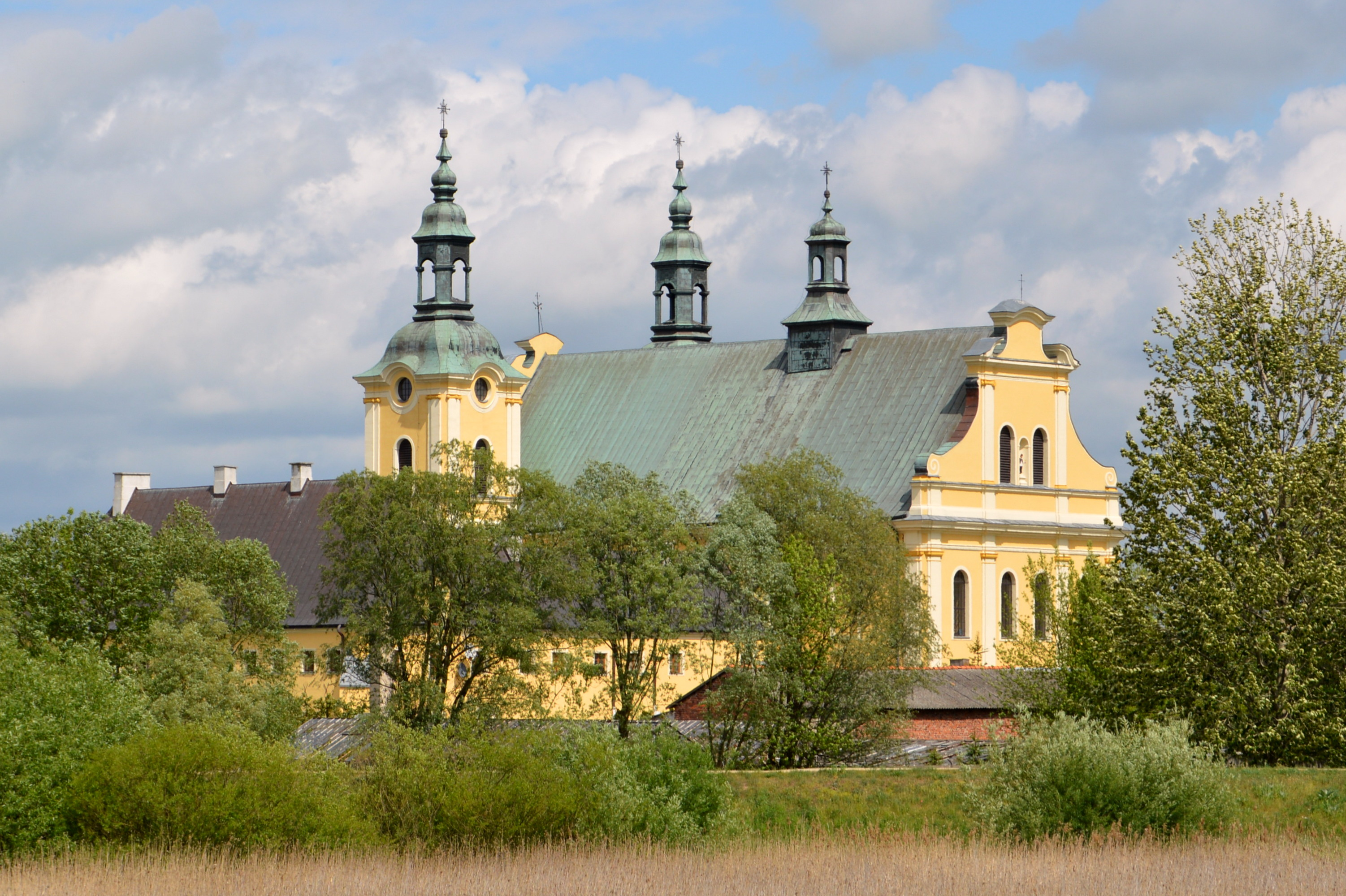 Kościół i klasztor bernardynów w Kole - widziany znad zalewu Warty